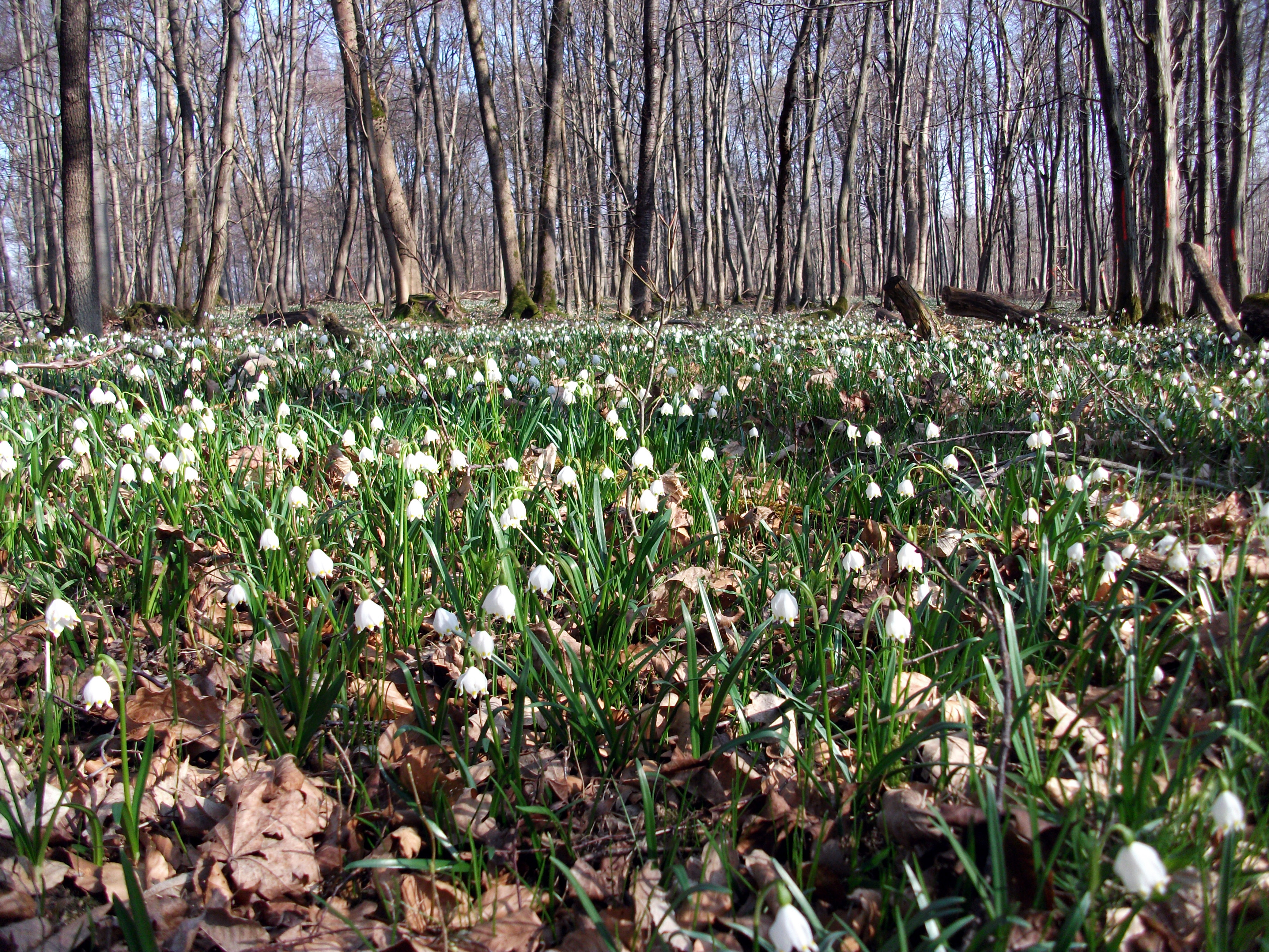 Märzenbecher (Leucojum vernum) im Boyneburger Forst, Naturschutzgebiet Boyneburg und Schickeberg bei Breitau, WDPA 81445.